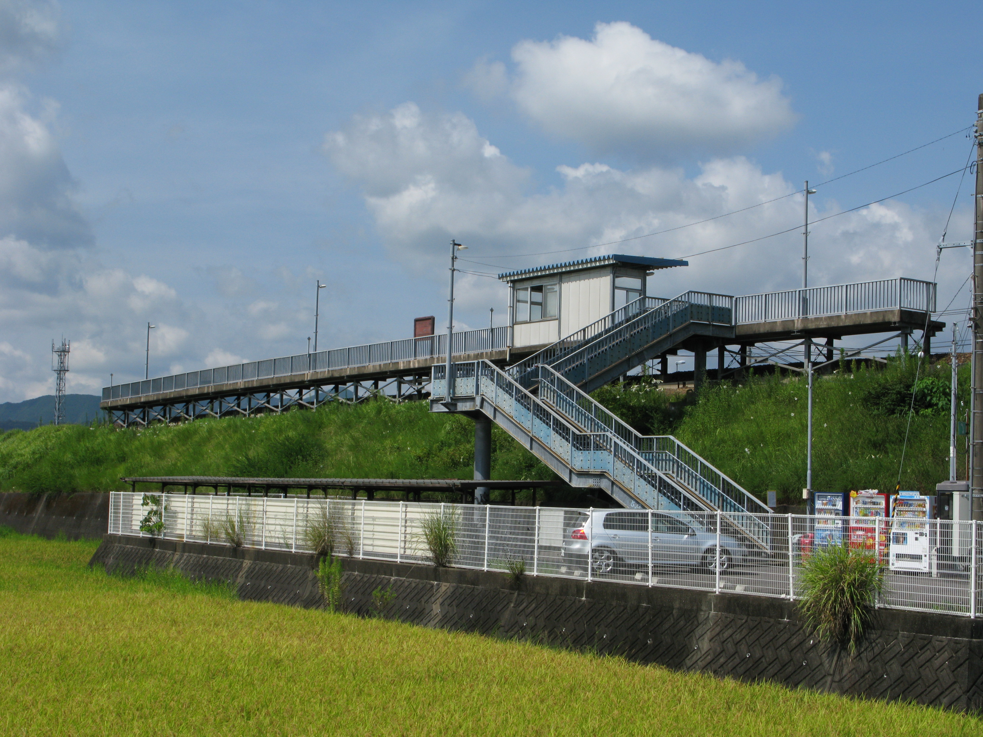 古津賀駅全景